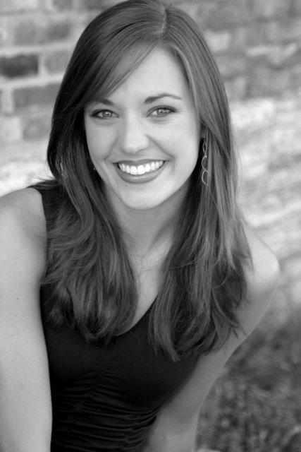 Laura Osnes, February 2007 in Los Angeles